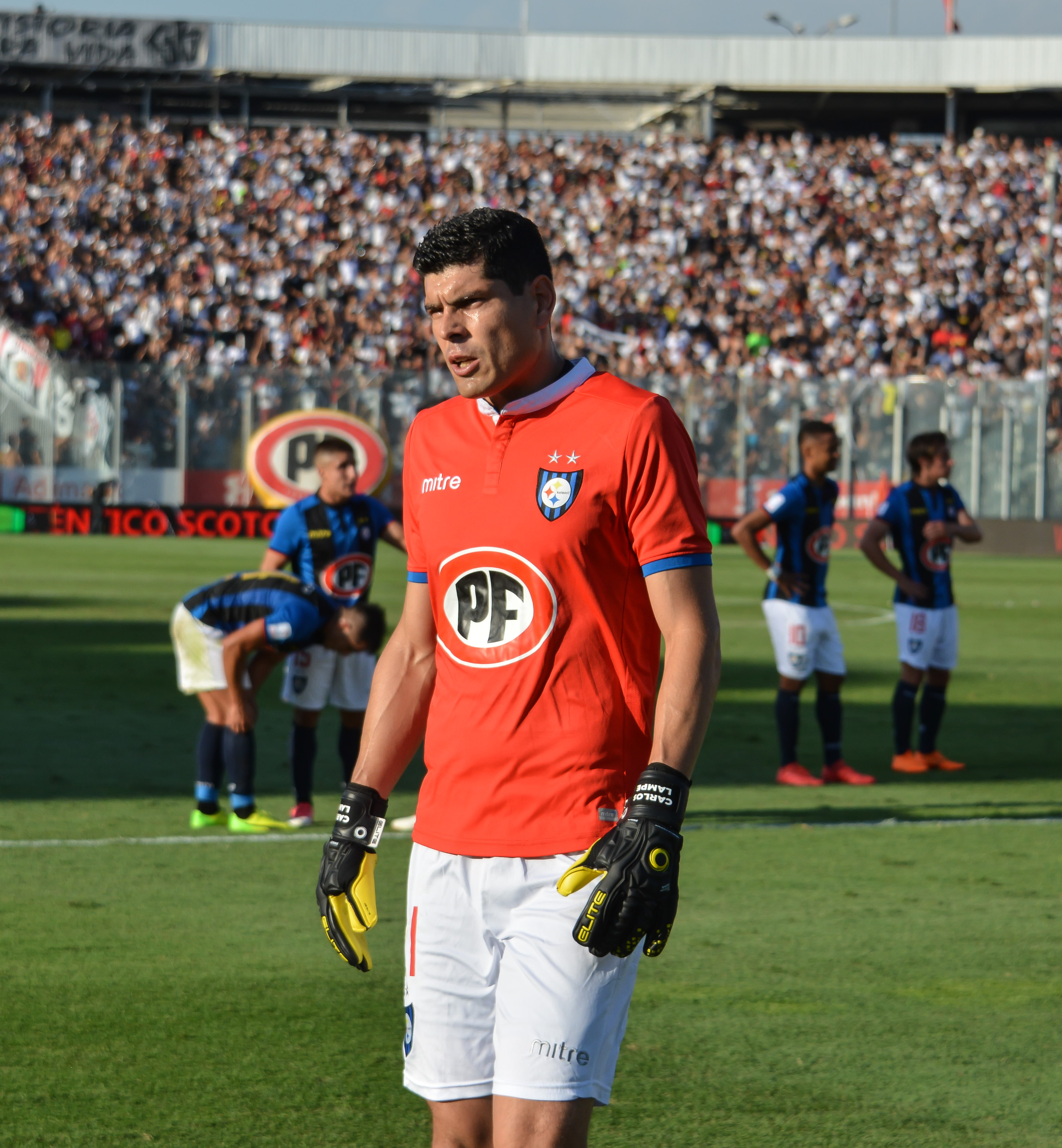 Carlos Lampe, Colo Colo v Huachipato, Estadio Monumental, Santiago, Chile.